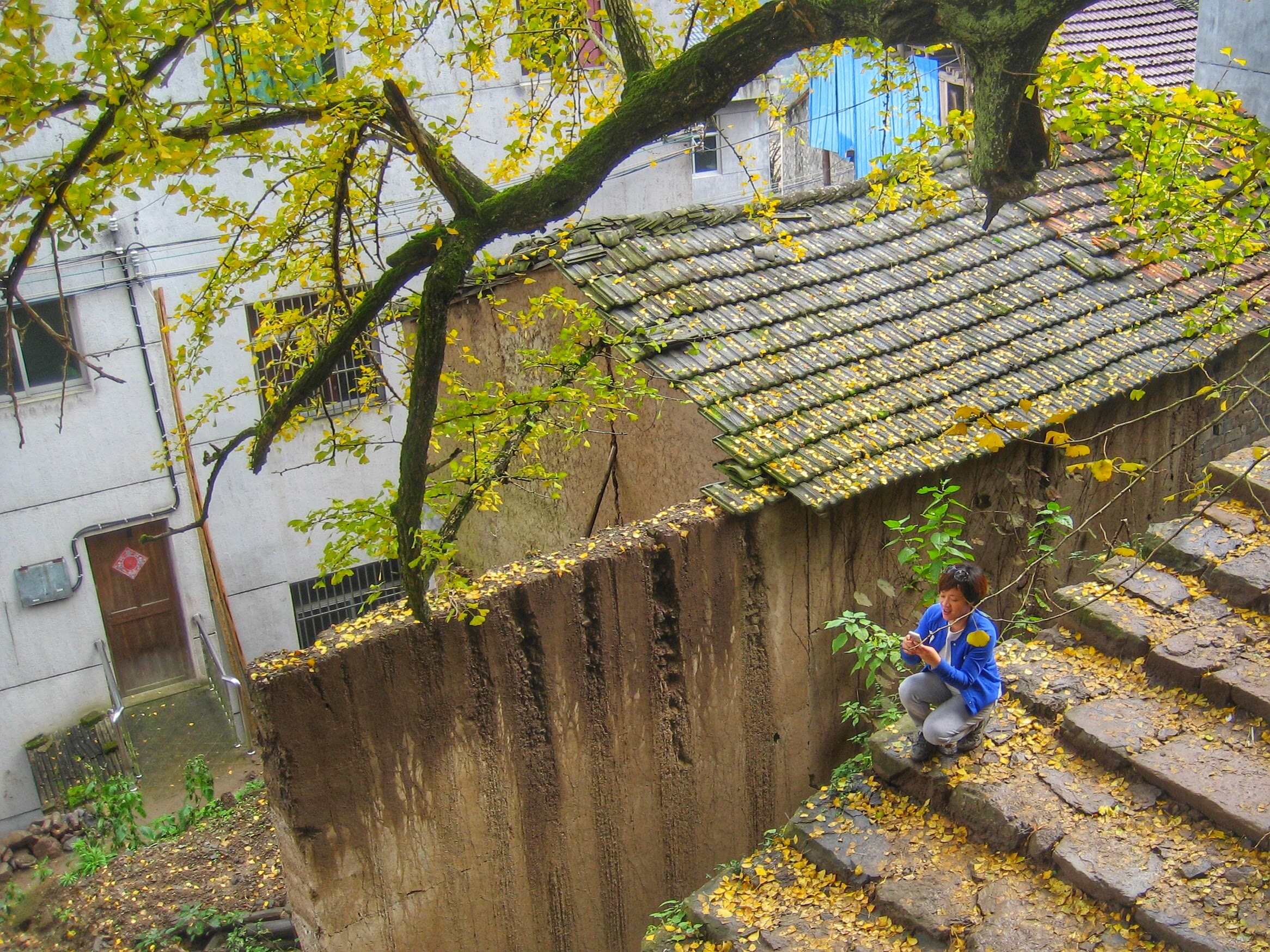 磐安白云古银杏